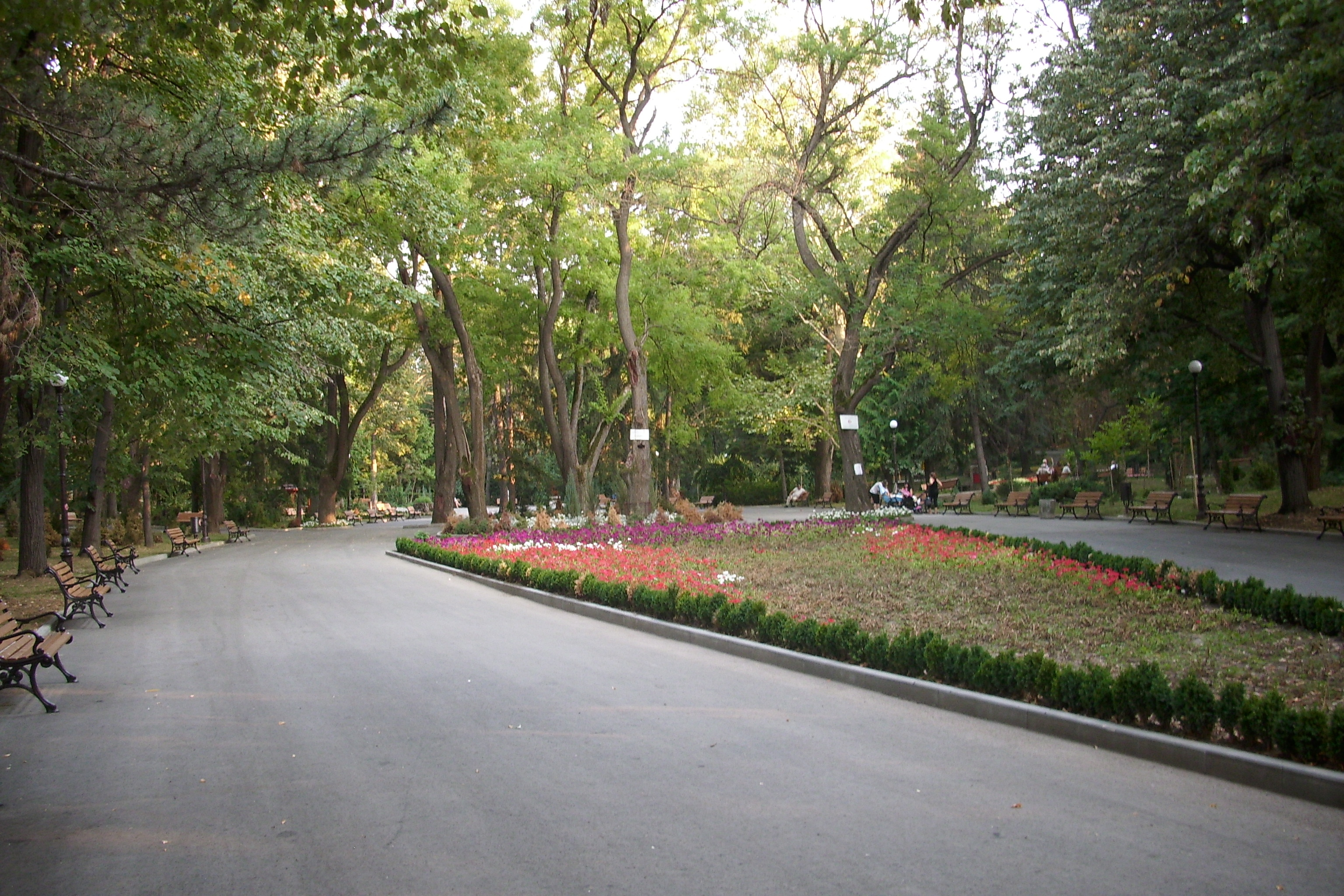 Градската градина в Попово